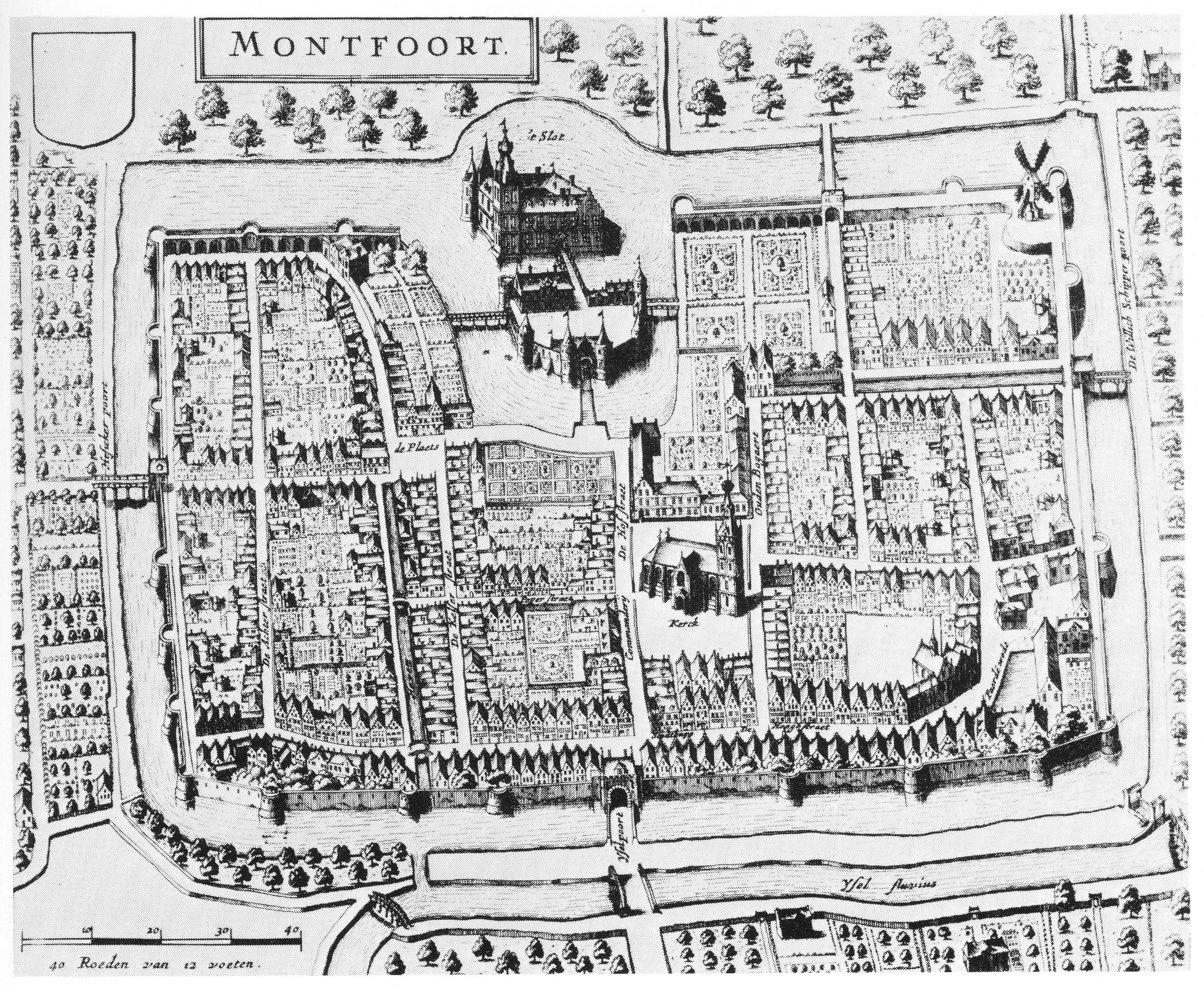 Plattegrond van Montfoort